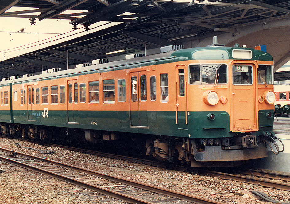 国鉄 クハ115-1